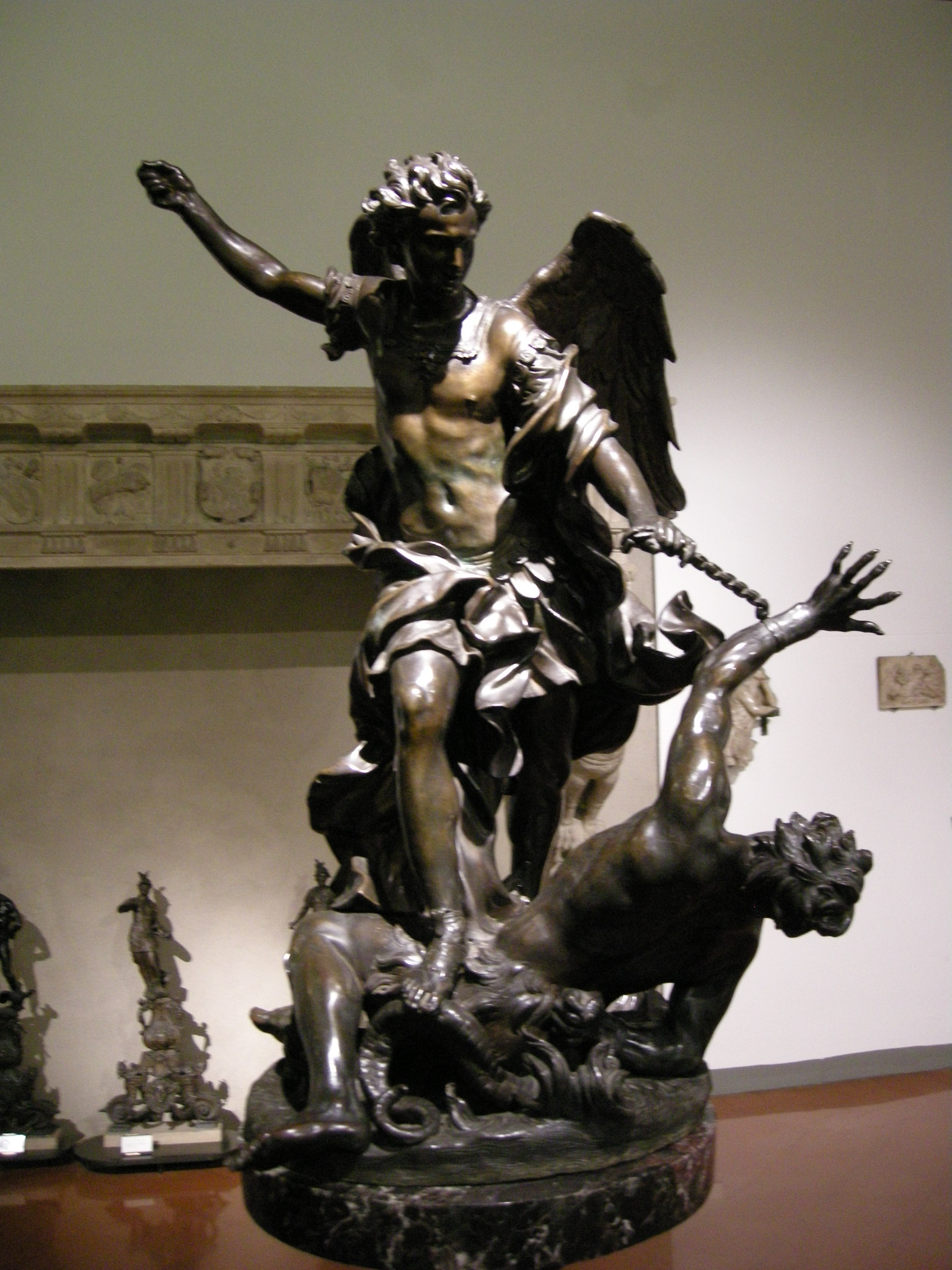 Alessandro Algardi, San Michele arcangelo abbatte il demonio, bronzo nel Museo civico medievale a Bologna, inv. 1504.